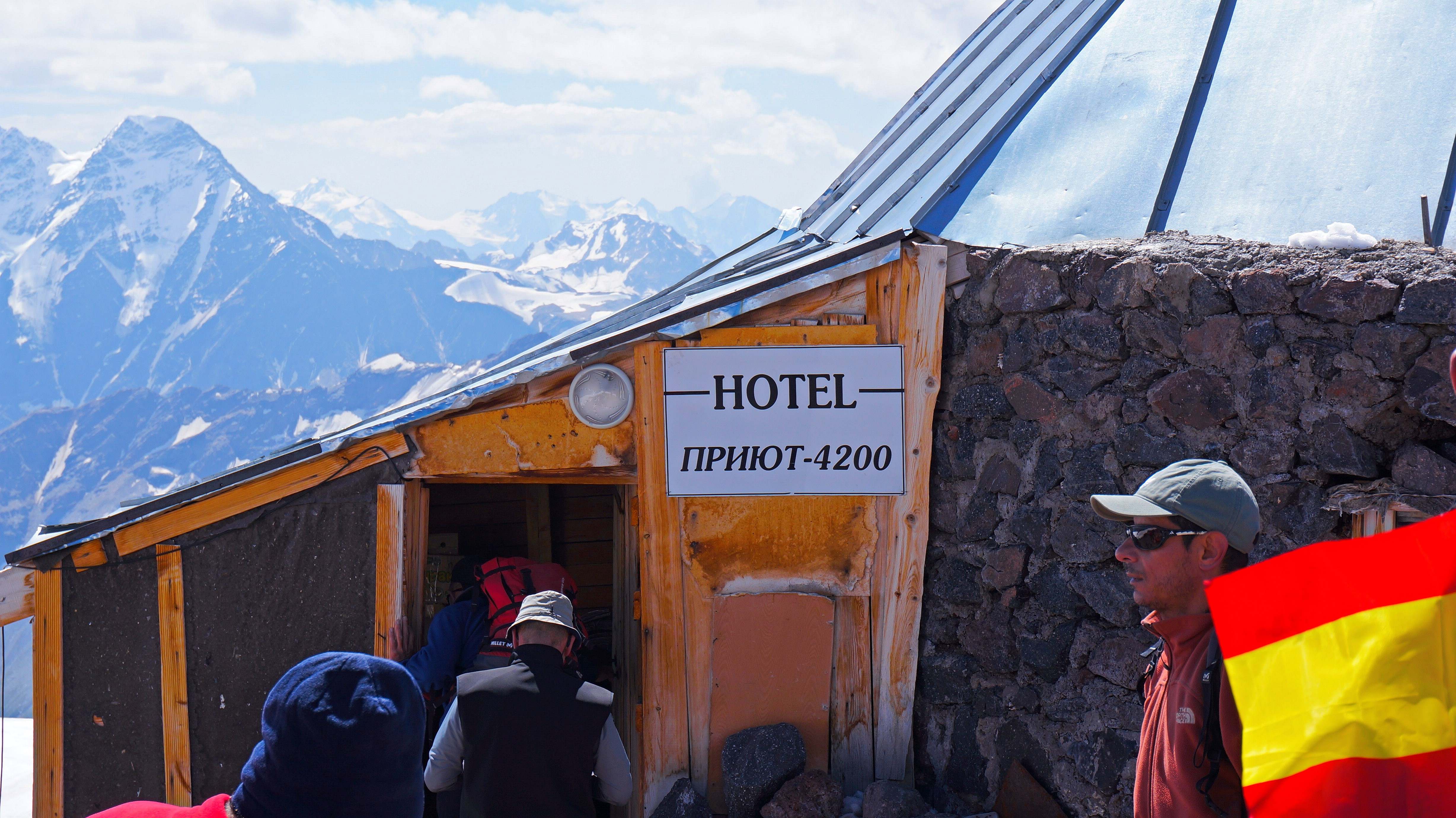 Elbrus Prijut 11 - Berglager 4.200 m